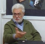 D-ro Ehsan Naragi, fama irana sociologo, en la oficejo de Irana Esperanto-Asocio.